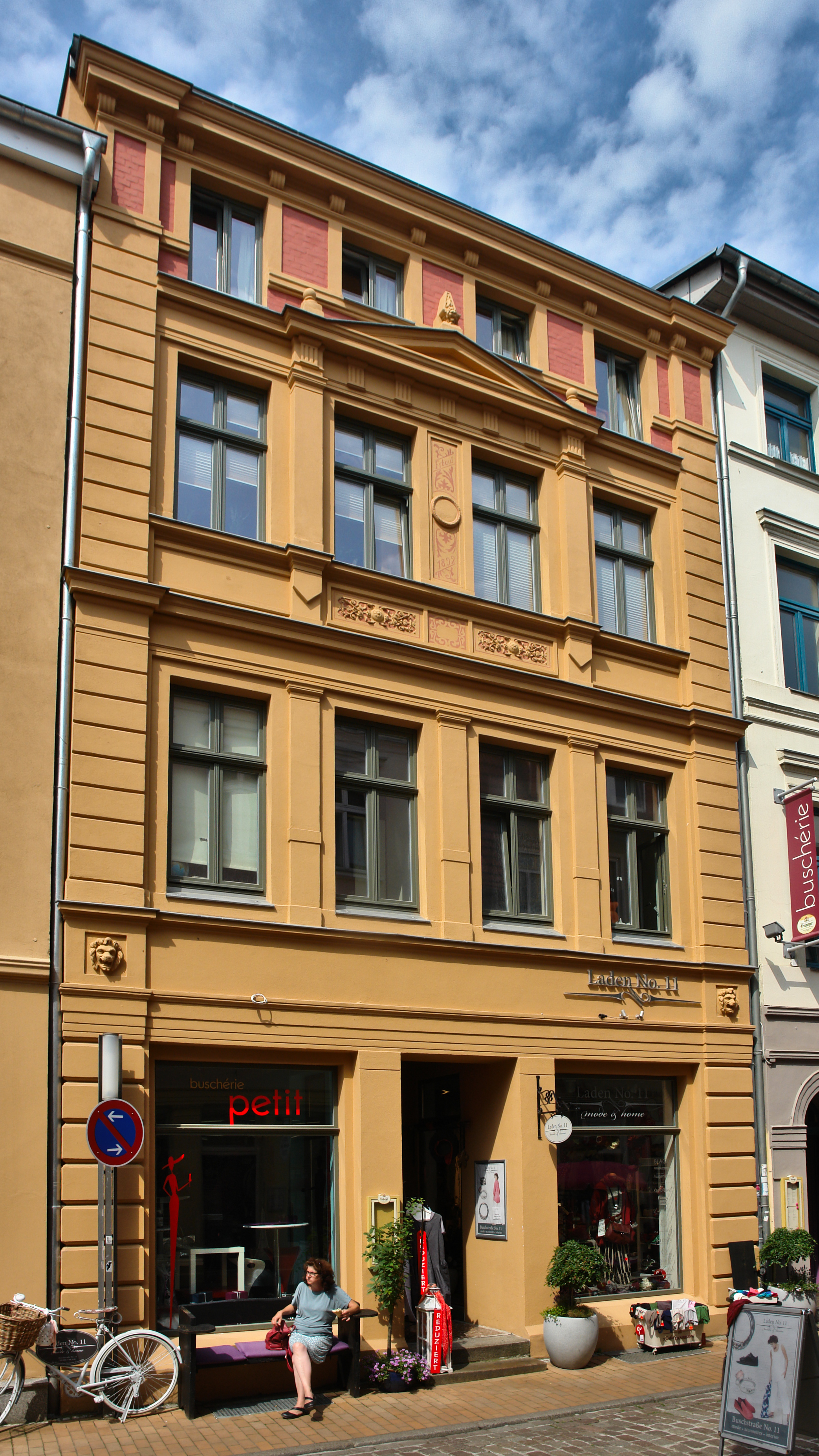 Buschstraße 11, 19053 Schwerin